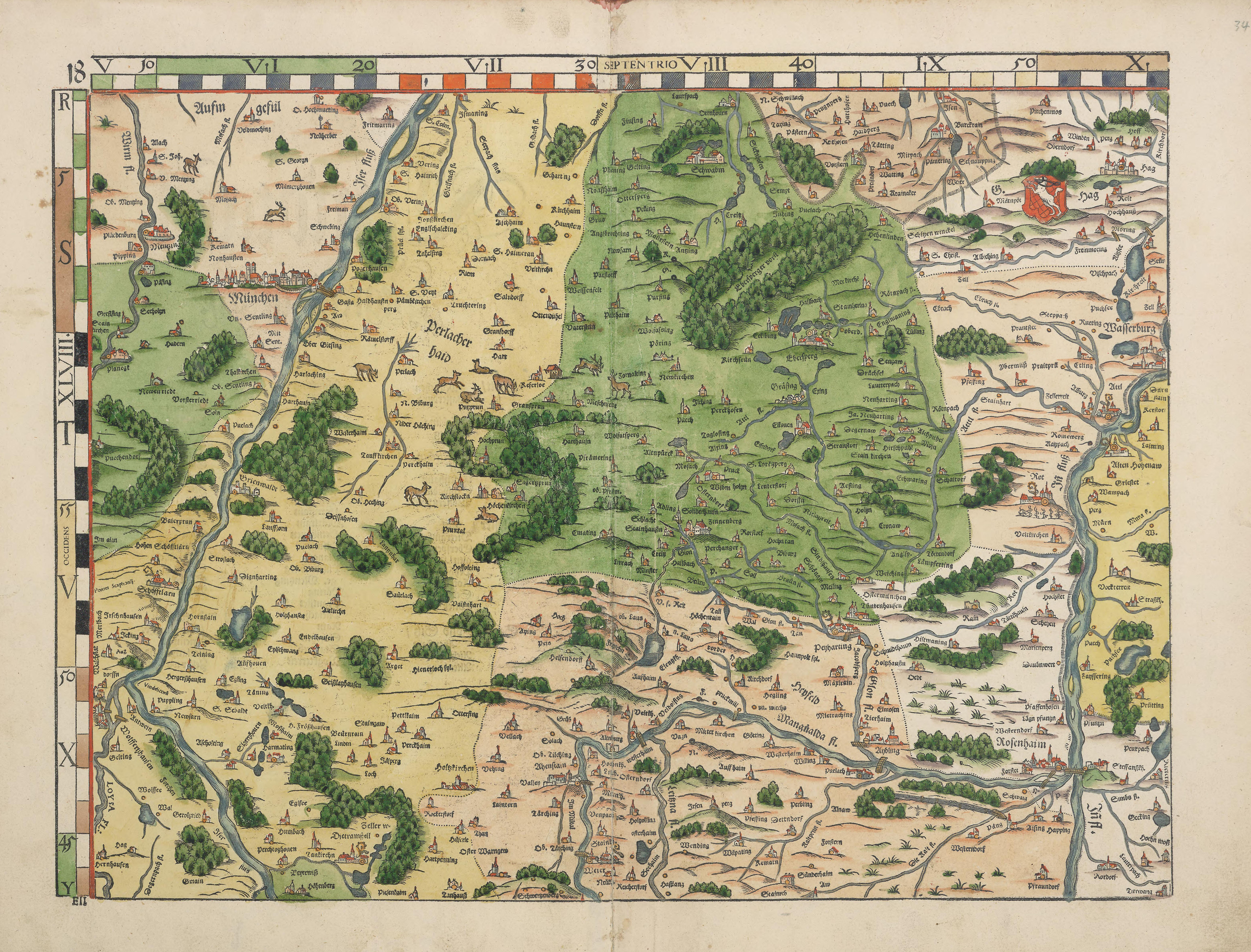 Philipp Apian - Bairische Landtafeln von 1568 (Tafel 18) ca. 1:140.000, Gesamtgröße des Originals 156 x 159 cm, je Blatt 43 x 33 cm Auf der Basis der „Großen Karte“ ließ Philipp Apian 1566 von Jost Amman Holzschnitte im kleineren Maßstab von 1:144.000 anfertigen. Diese so genannten Bairischen Landtafeln, aufgeteilt in 24 Holzschnitte, verlegte Apian in seiner eigenen Druckerei. Die Genauigkeit der Landkarten wurde erst im 19. Jahrhundert übertroffen. Noch Napoleon benutzte sie für den Einmarsch in Bayern. Ein Originaldruck der Karte ist im Stadtmuseum Ingolstadt ausgestellt, die Druckstöcke befinden sich heute im Bayerischen Nationalmuseum in München. Abraham Ortelius verbreitete kolorierte Kupferstiche dieser Landtafeln in Buchform „ex tabula Philippi Apiani“.